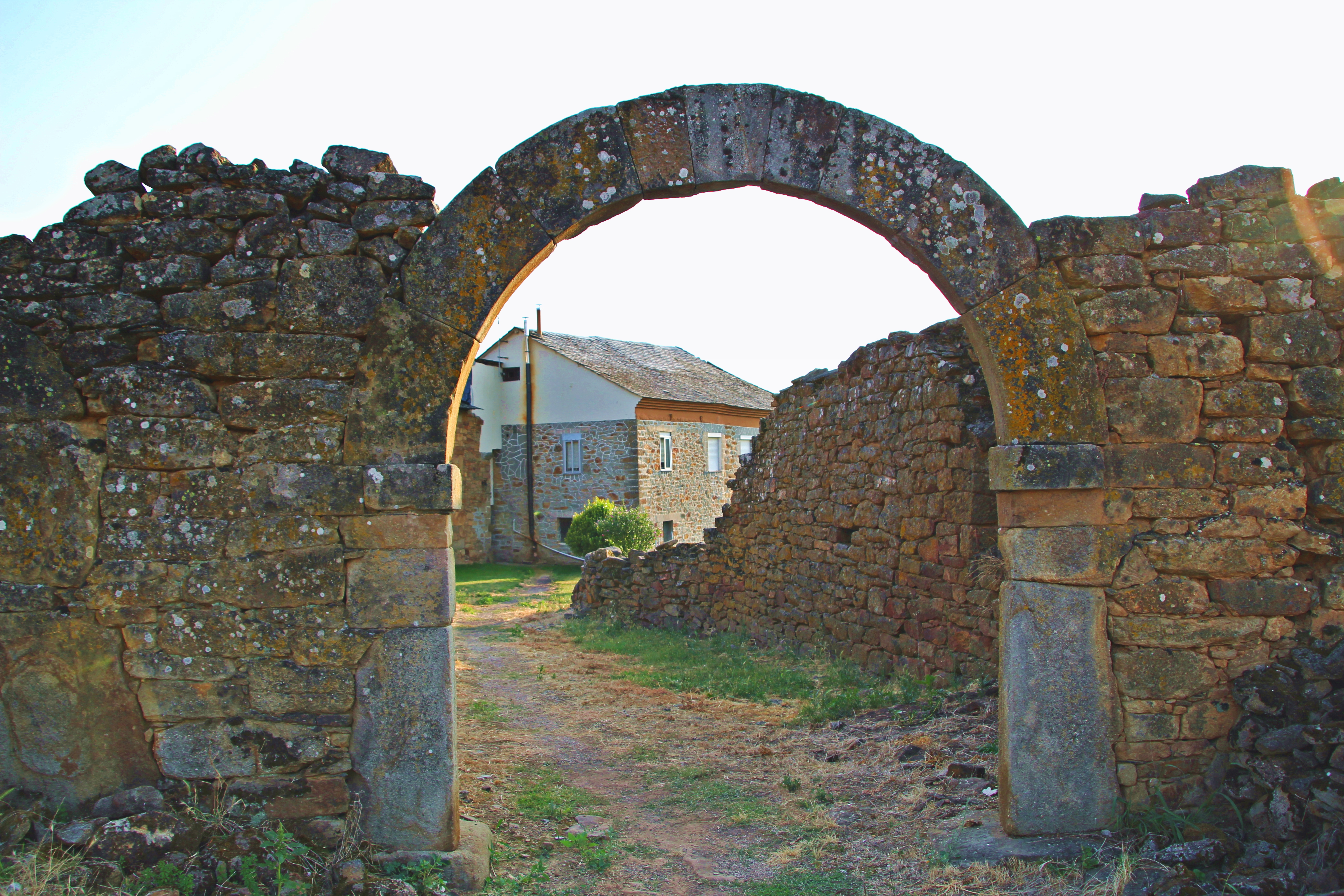 Langre, localidad de Berlanga del Bierzo, comarca de El Bierzo, provincia de León.